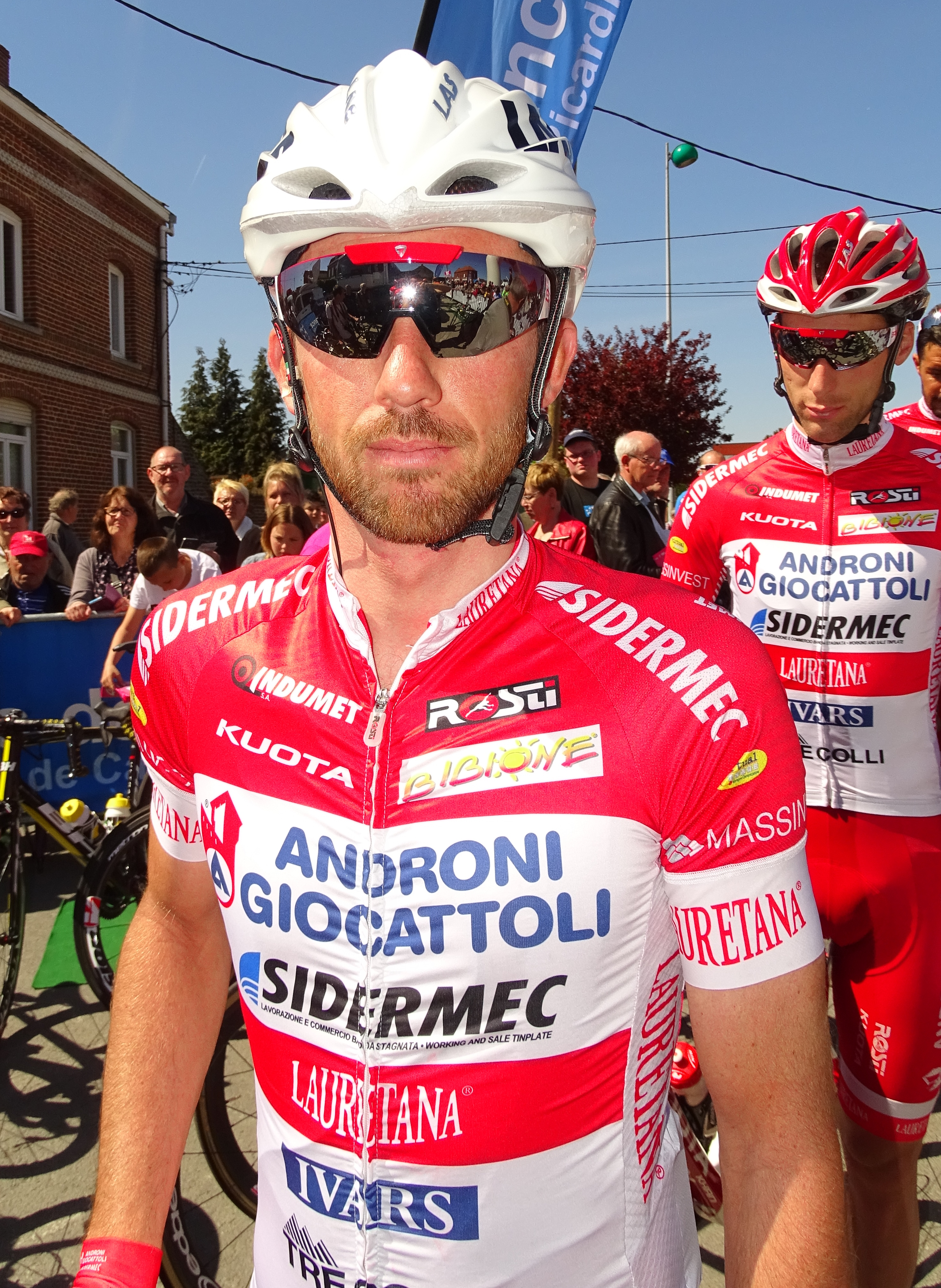 Reportage réalisé le jeudi 5 mai 2016 à l'occasion du départ et de l'arrivée de la deuxième étape des Quatre jours de Dunkerque 2016 à Aniche, Nord, Nord-Pas-de-Calais, France.